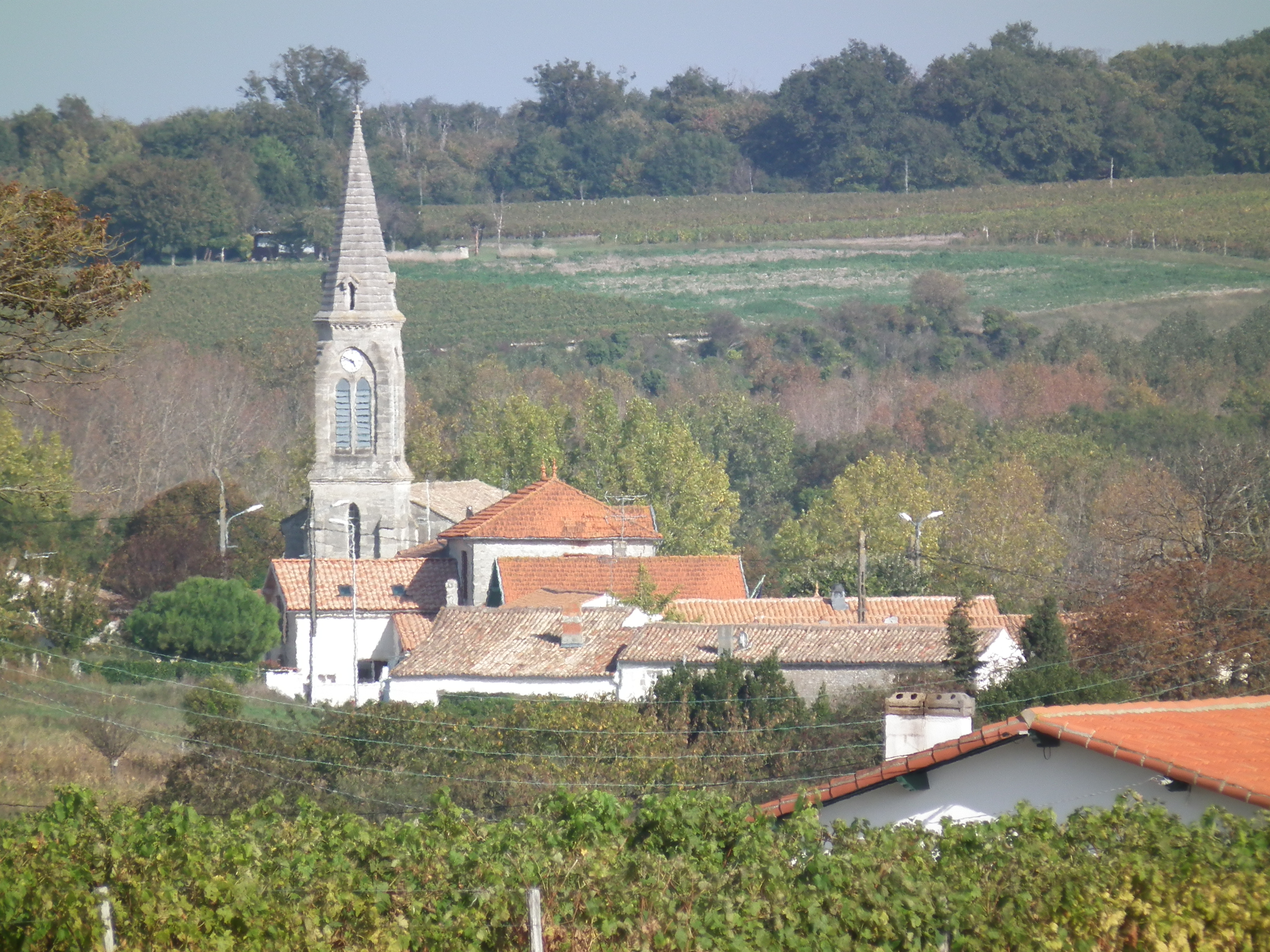 Vue de Barzan